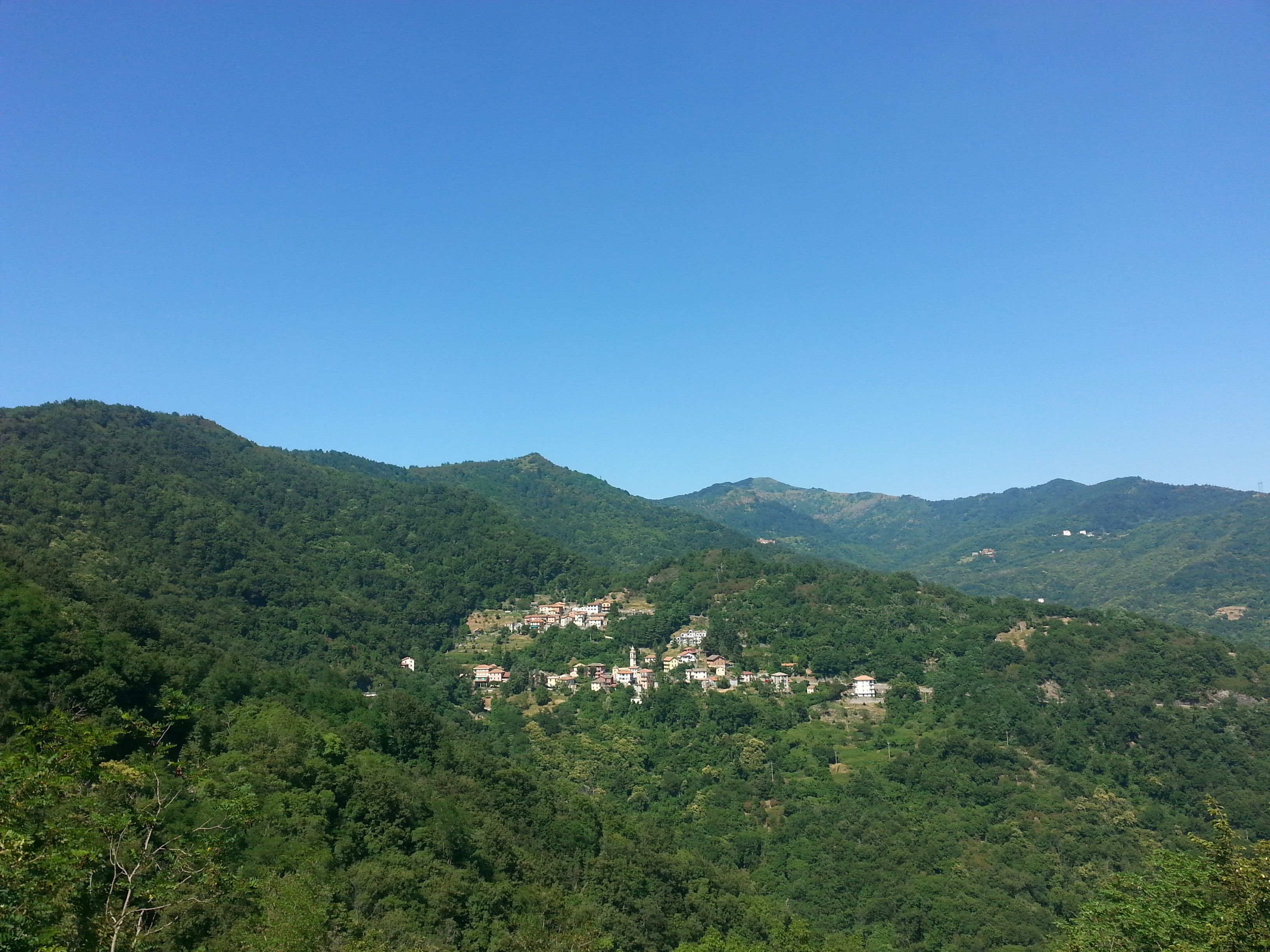 Una foto panoramica di Boasi